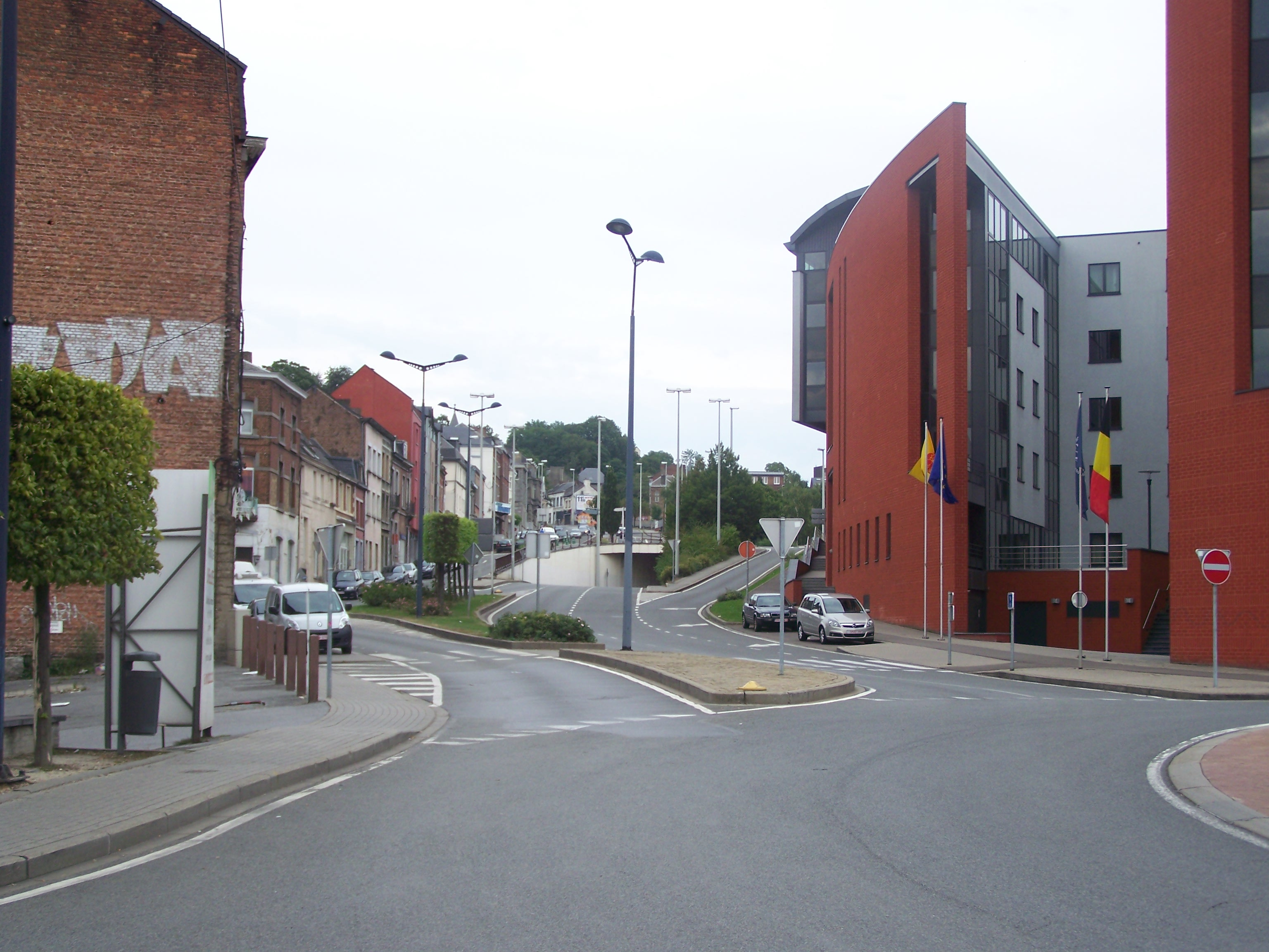 Vue de Bomel et de la montée vers Bouge